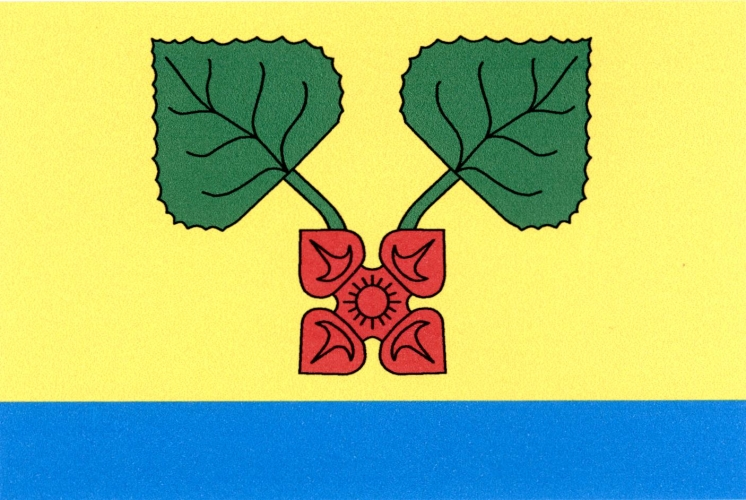 Vlajka obce Bítovany: List tvoří dva vodorovné pruhy, žlutý a modrý, v poměru 4 : 1. Ve žlutém pruhu kosmo červený plod kotvice, z něhož vyrůstají dva odkloněné zelené listy. Figury na vlajce mají vztah k chráněnému území rybníka Farář – modrá vlnitá pata štítu – a k vzácnému výskytu rostliny kotvice plovoucí – plod (ořech) a listy. Dva listy symbolizují, že obec tvoří dvě části. Zlatá je inspirována chráněnou geologickou lokalitou jílovitých a kvádrových pískovců ve stejném chráněném území.